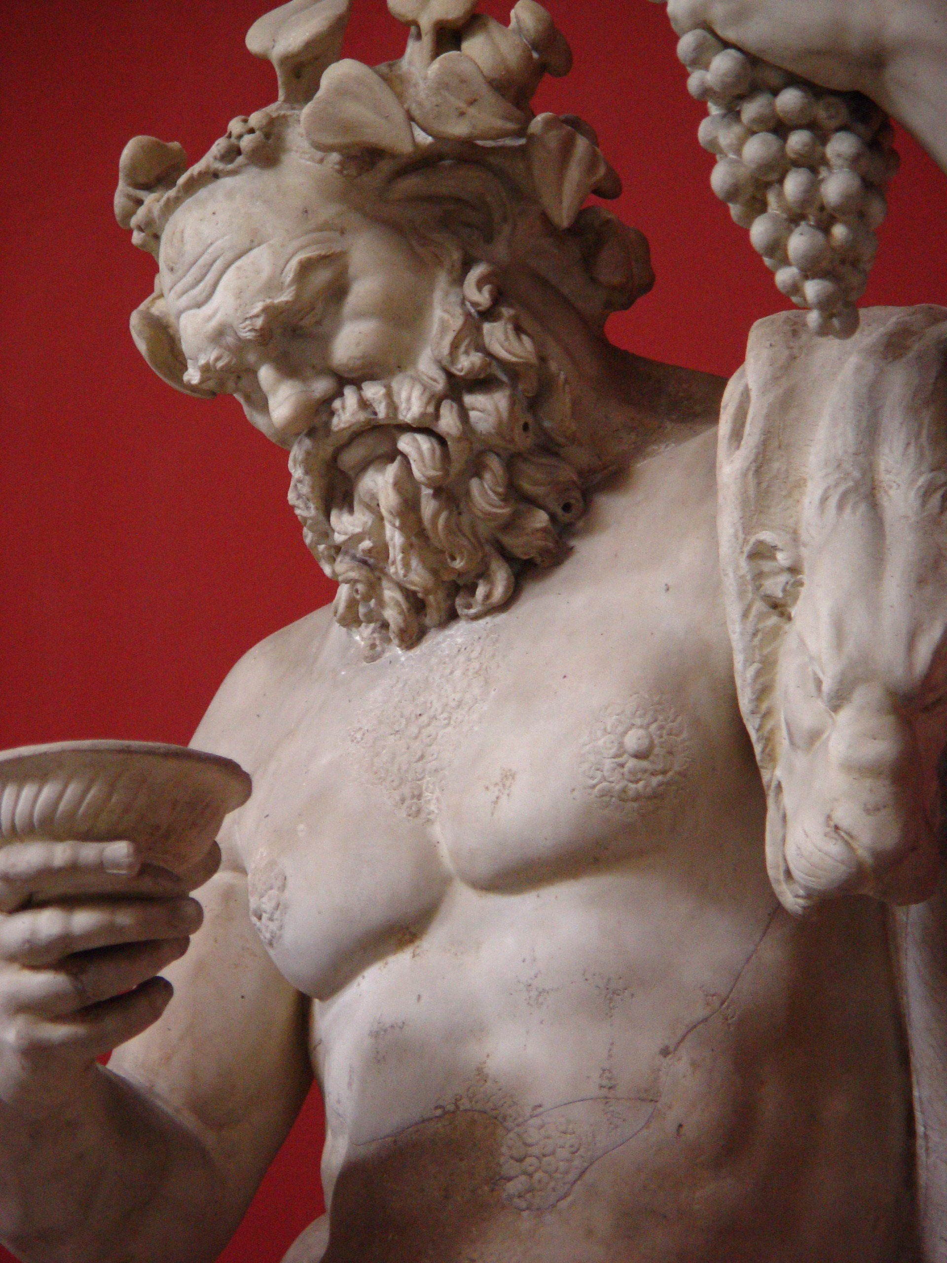 Bacchus im vatikanischen Museum